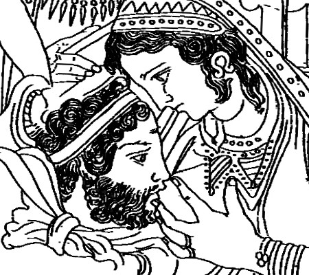 Bronzespiegel von Volterra (Archäologisches Nationalmuseum Florenz)Originalbeschreibung der Quelle: „Uni nursing the adult Hercle in front of divine witnesses. Etruscan mirror from Volterra in Florence, Museo Archeologico Nazionale.“ Ausschnitt besteht unter Datei:Bronzespiegel von Volterra - Detail 2 cropped.jpg